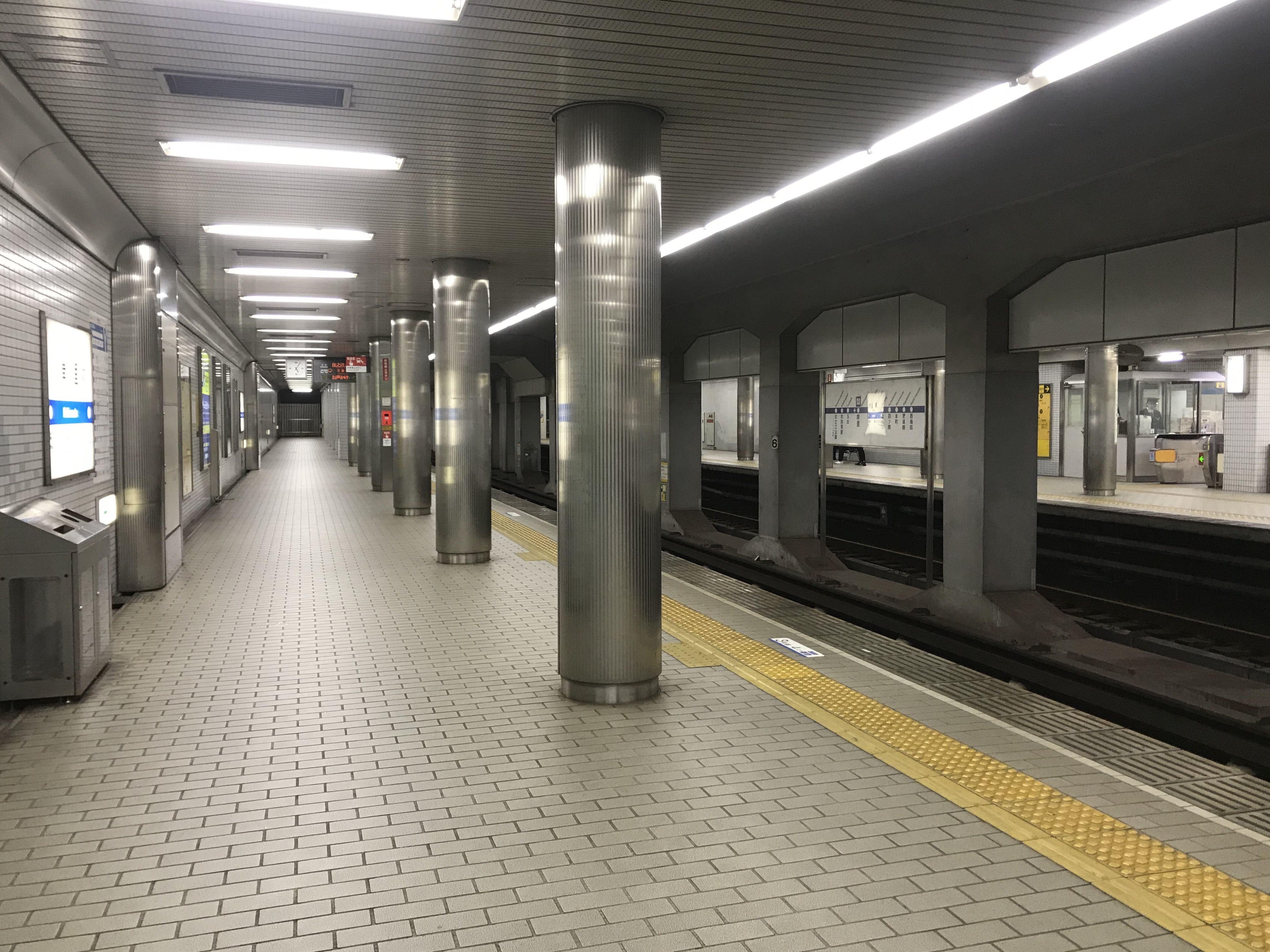 岸里駅のホーム(奥は玉出方面)